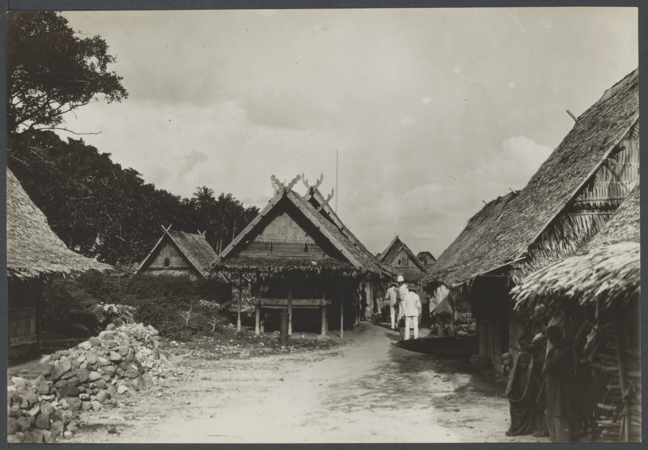 Academische Collecties: 1899-1900, Siboga-expeditie naar Nederlands Oost-Indië, onder leiding van Max Wilhelm Carl Weber Drie leden van de expeditie lopen door de kampong.